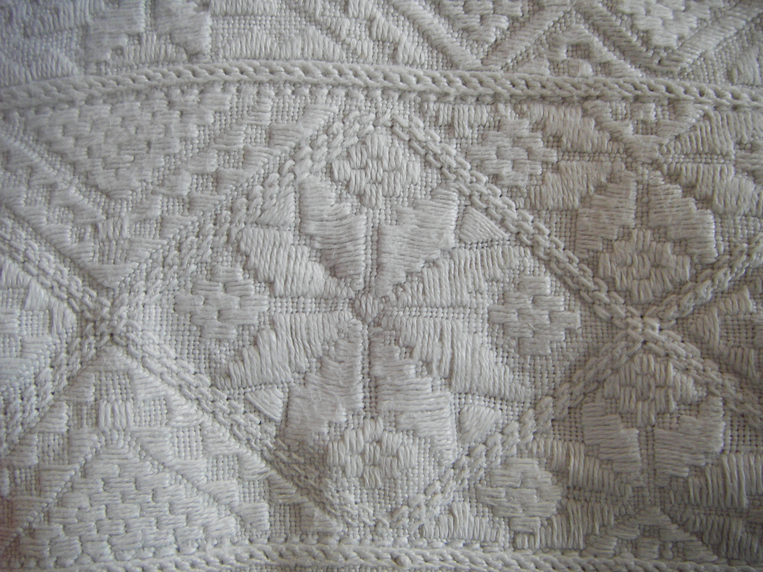 Hedebosyning fra perioden ca. 1700